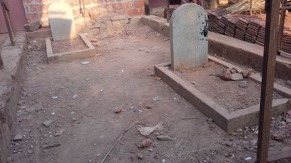 മലബാർ സമരത്തിൽ കൊല്ലപെട്ട ബ്രിട്ടിഷ് പട്ടാളക്കാരുടെ ശവകല്ലറ. തിരൂരങ്ങാടി ചന്തപ്പടി